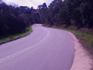 Trecho do kilómetro 55 da Rodovia Vice-Prefeito Salvador Pacetti ("Estrada Real" - SP-171), em Cunha, SP, Brasil.